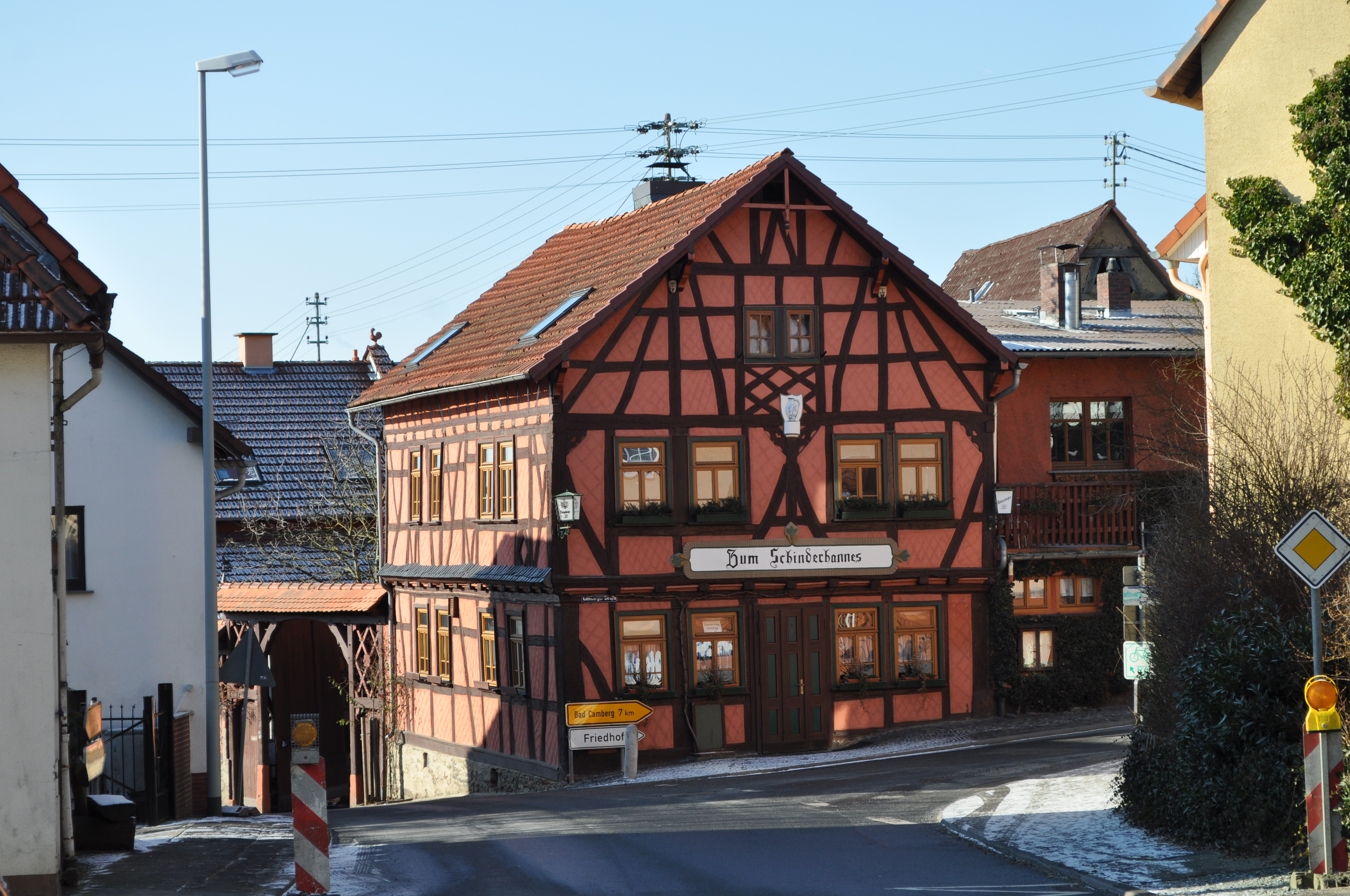 Denkmalgeschütztes Haus Gasthof Schinderhannes in Steinfischbach